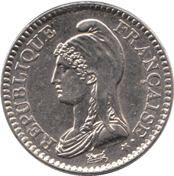 avers d'une pièce commémorative de 1 Franc République 1992